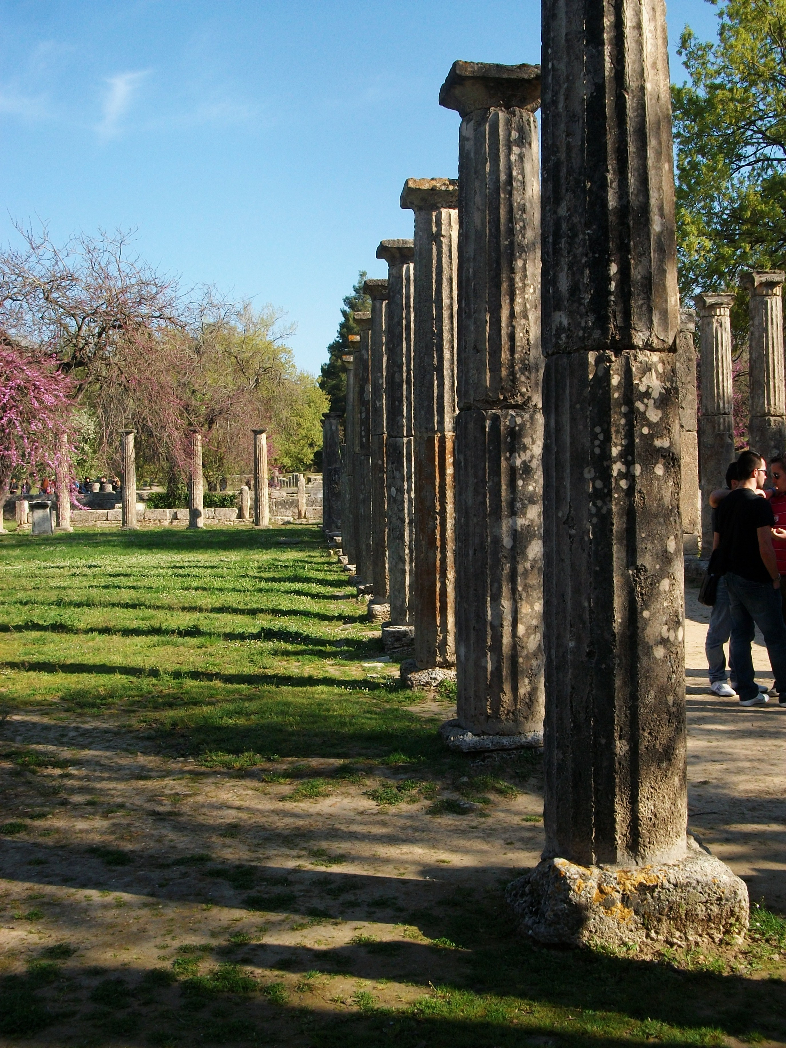 Palestra d'Olímpia, columnes.